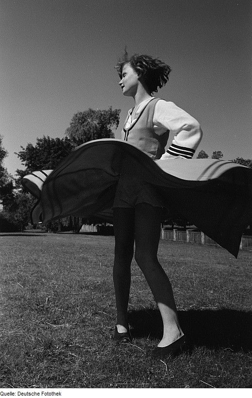 Original image description from the Deutsche Fotothek Tanzende junge Frau